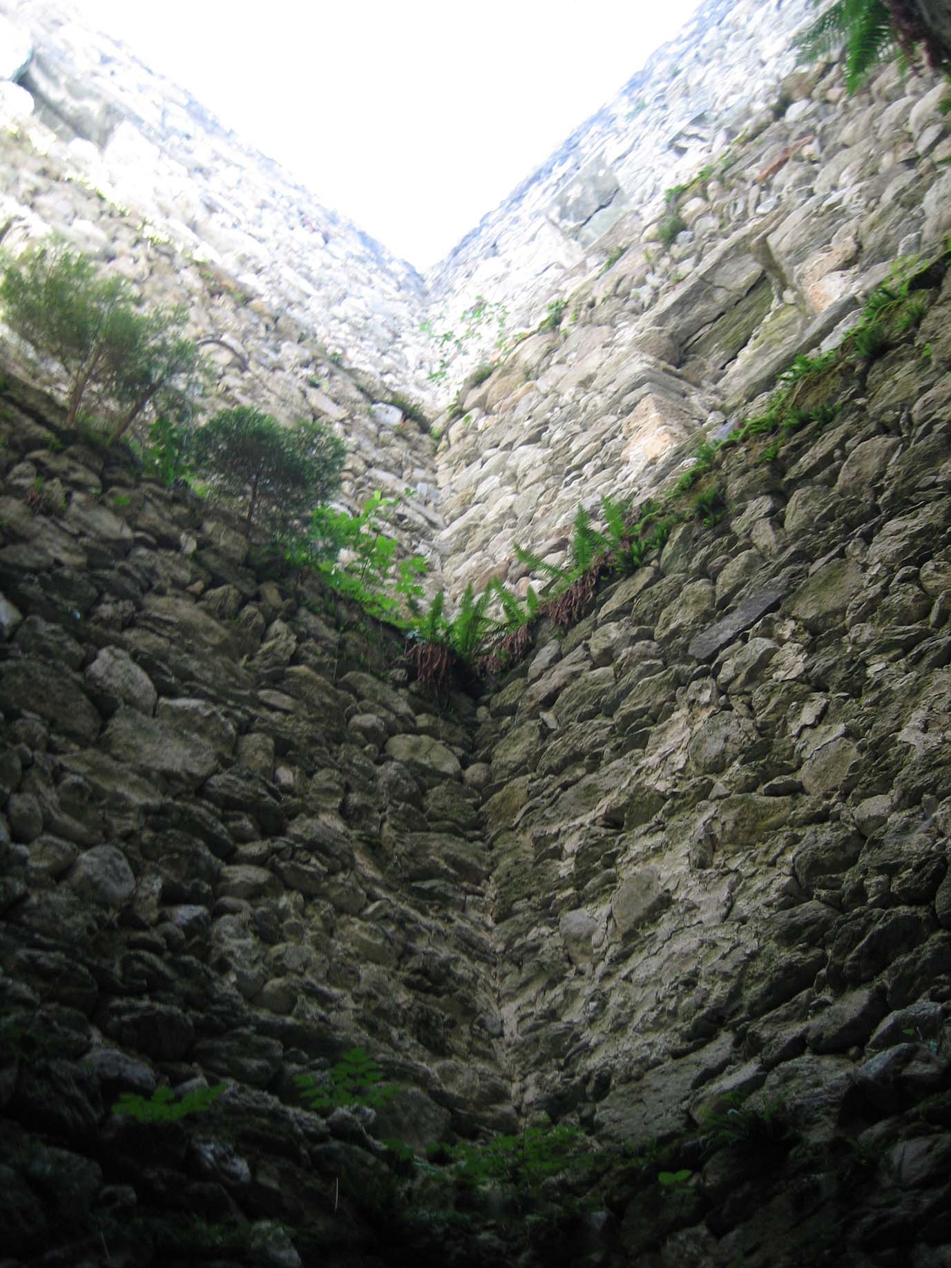 Inneres des Turmes